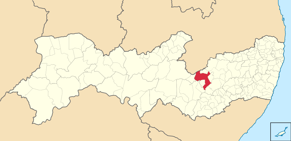 Mapa de Pesqueira (2)